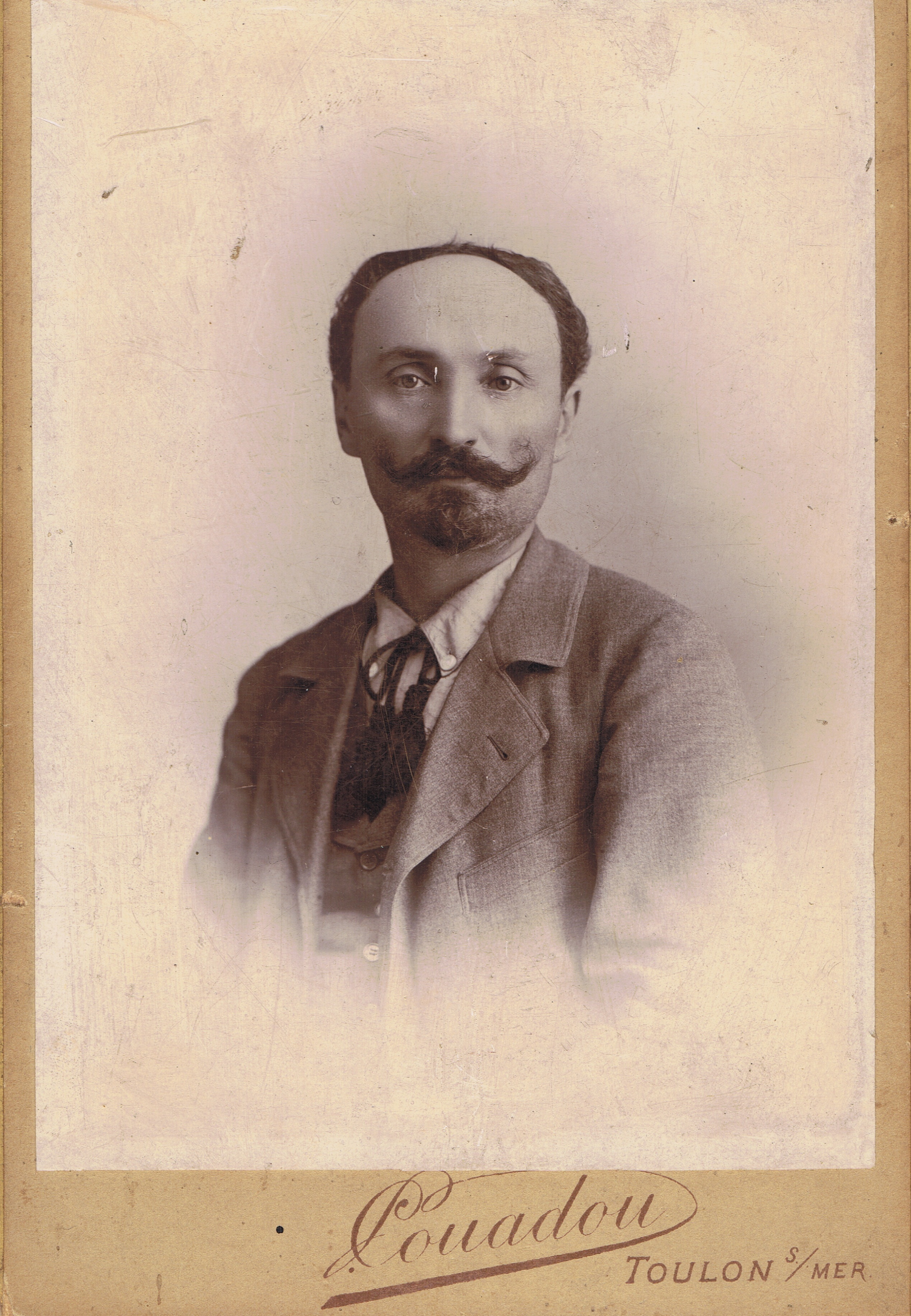 Portrait par Couadou à Toulon vers 880